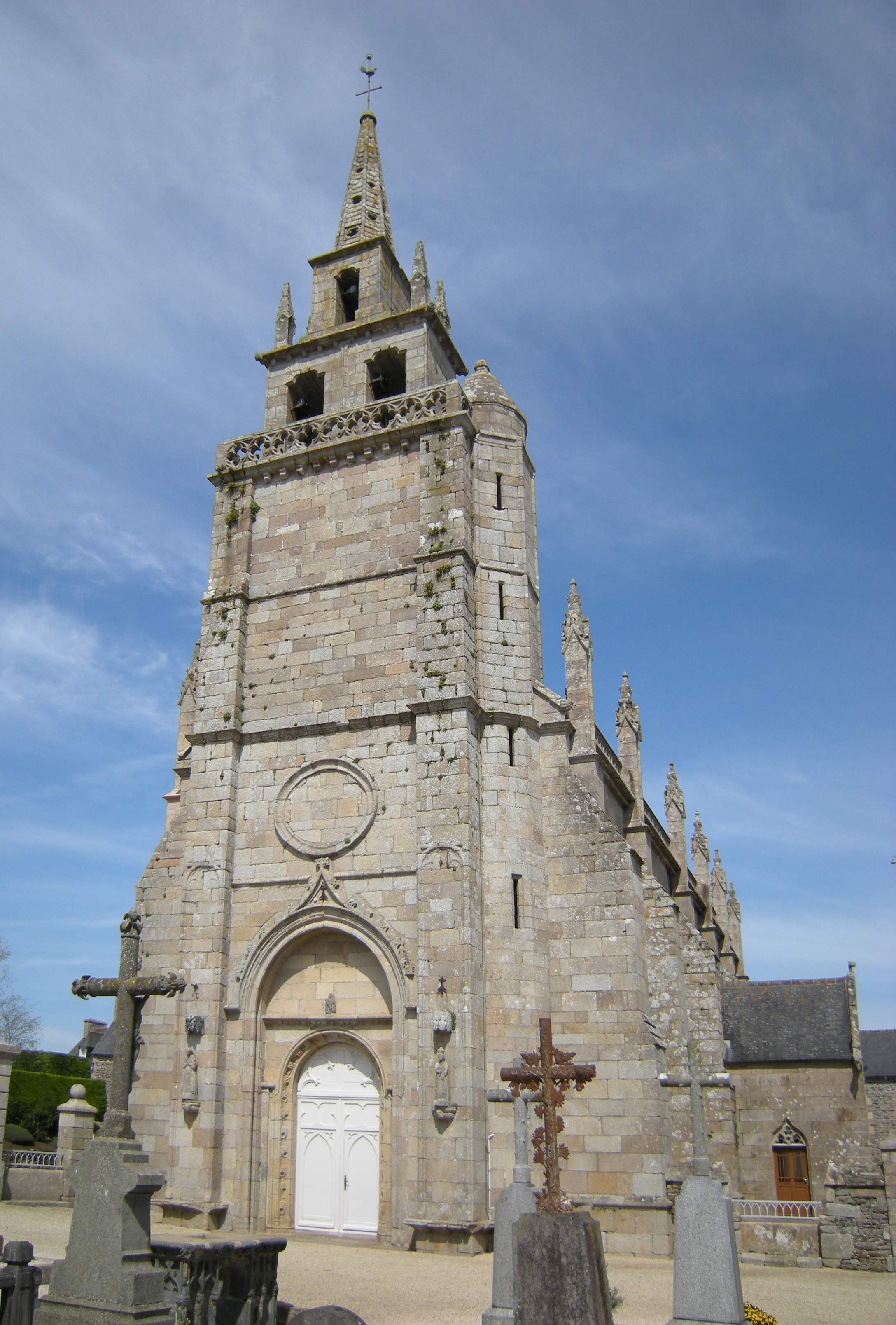 Église Saint-Yves du village de Minihy-Tréguier